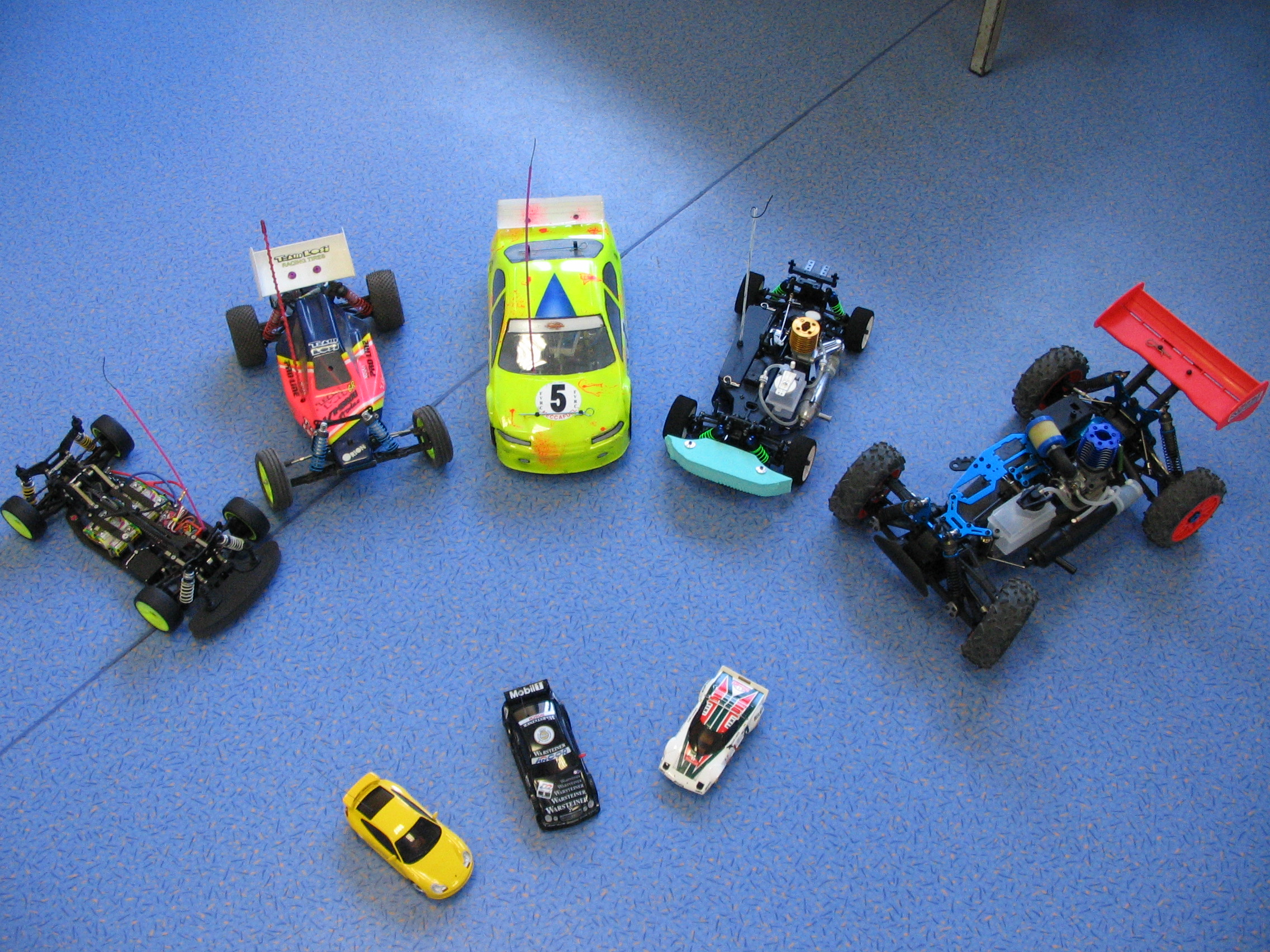 Le modélisme auto, une passion envahissante...